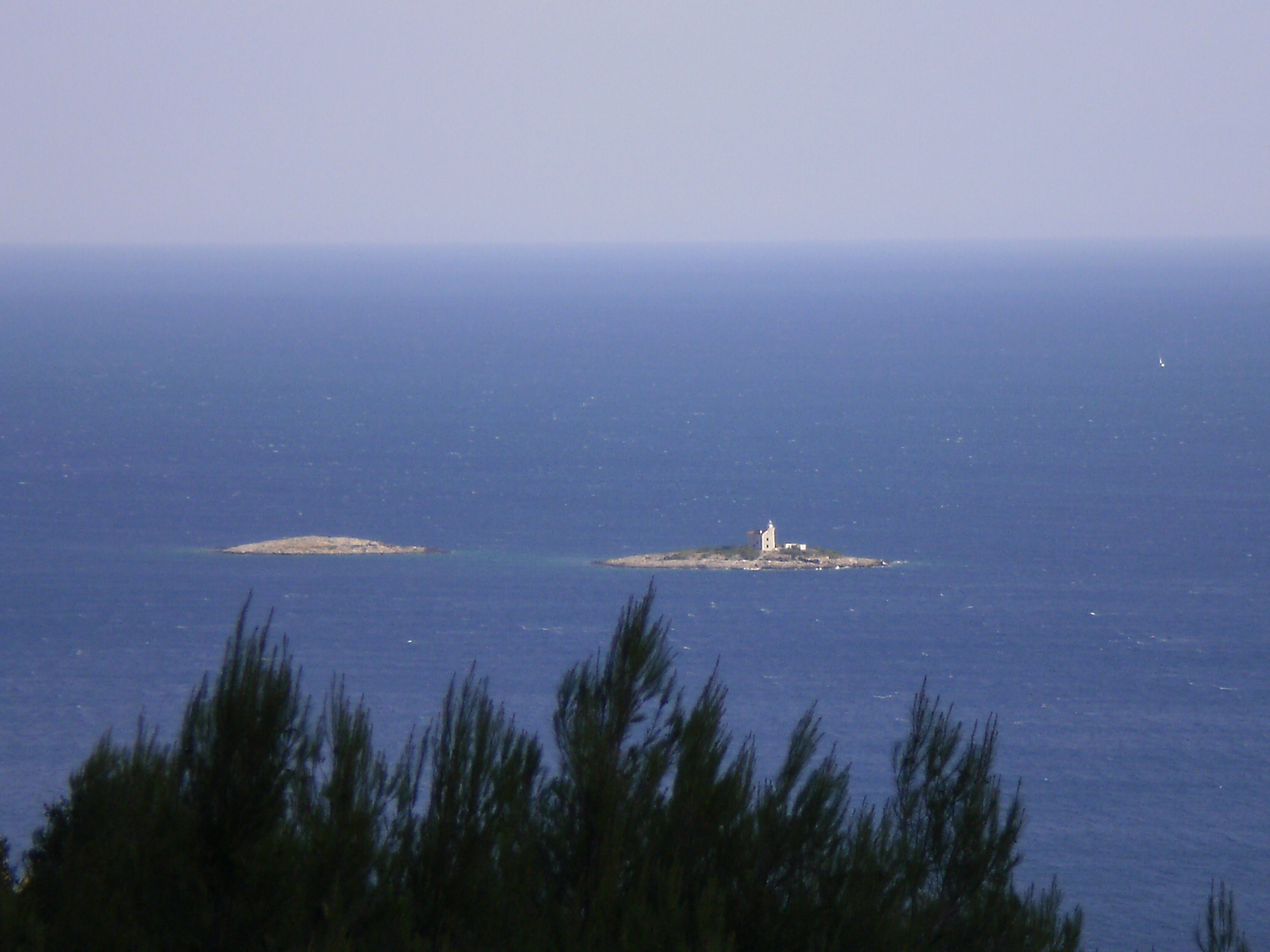 Mala i Vela Sestrica,pogled sa Vlaštice